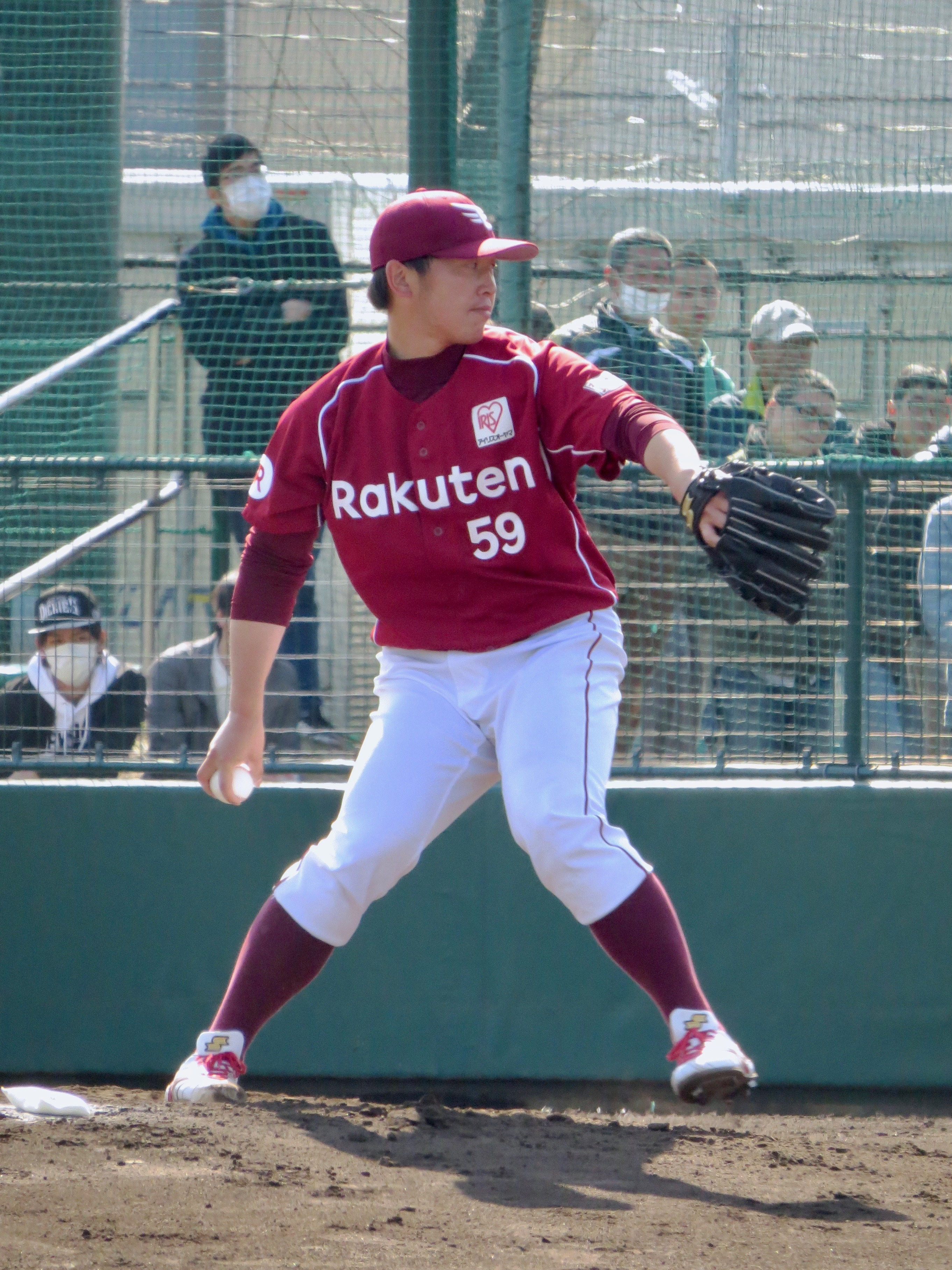 東北楽天ゴールデンイーグルス投手の菊池保則。ロッテ浦和球場にて。